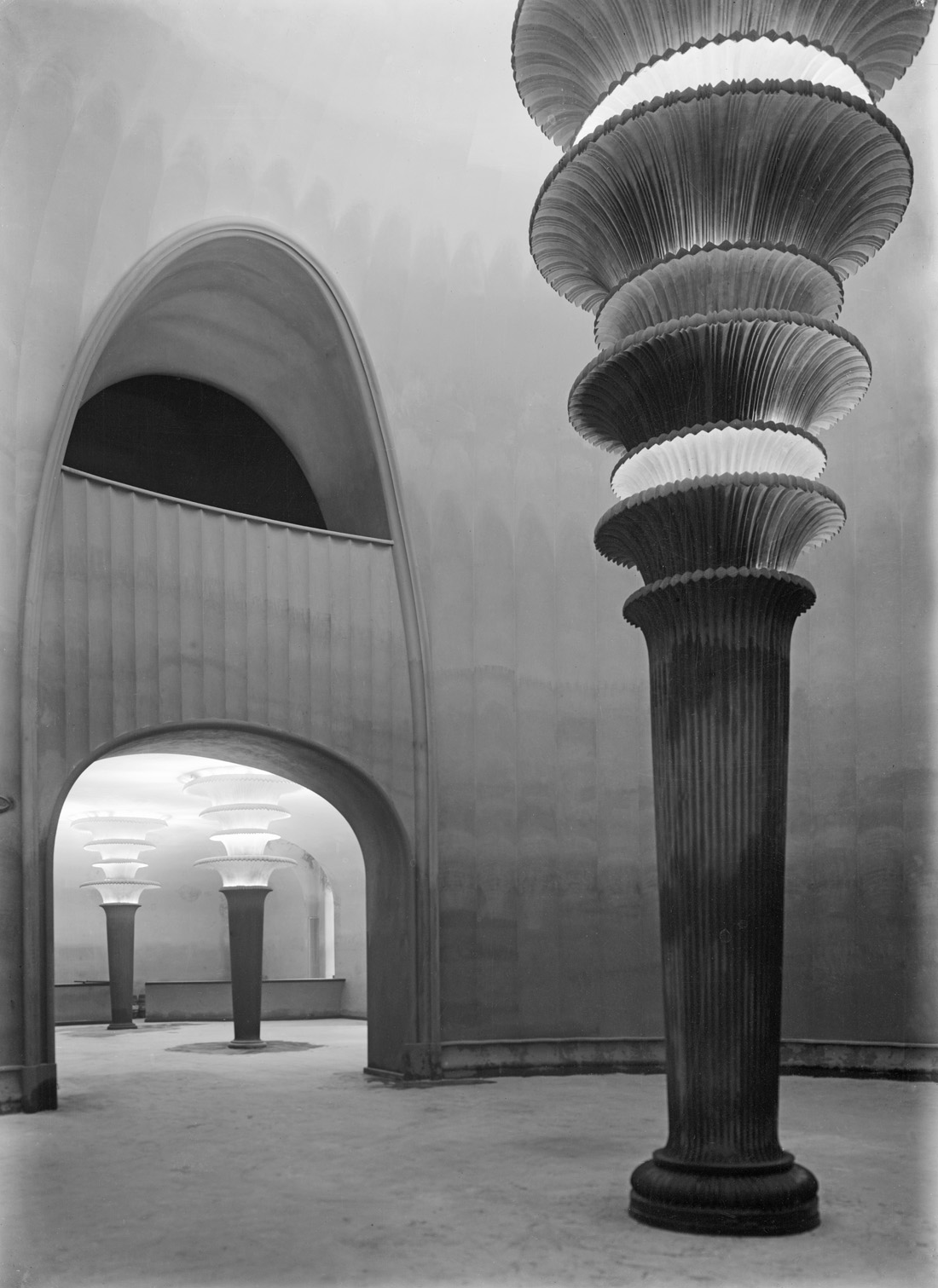 Großes Schauspielhaus von Hans Poelzig († 1936), Lichtsäulen im Foyer, Aufnahme um 1920